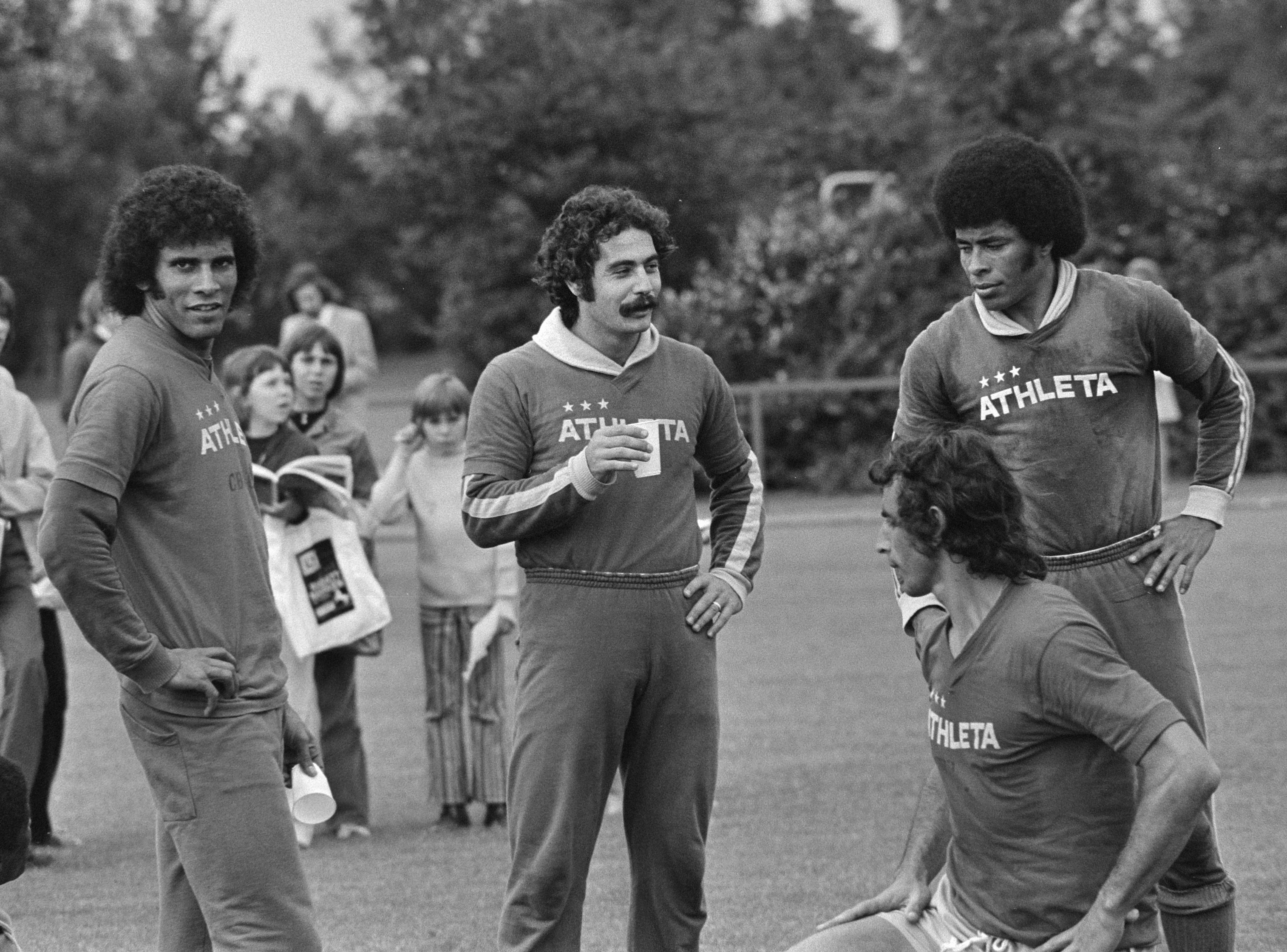 WK 74, training Brazilie; Valdomiro Vaz Franco, Roberto Rivelino, Jairzinho